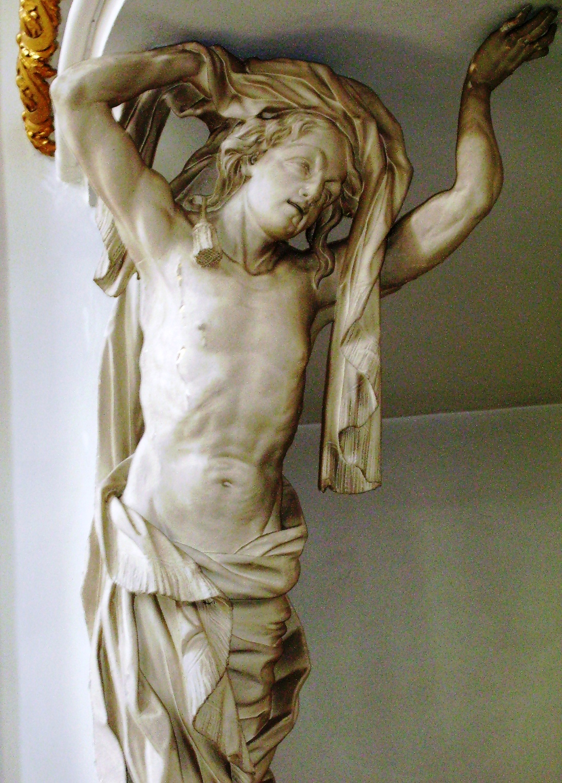 Hechingen, Germany